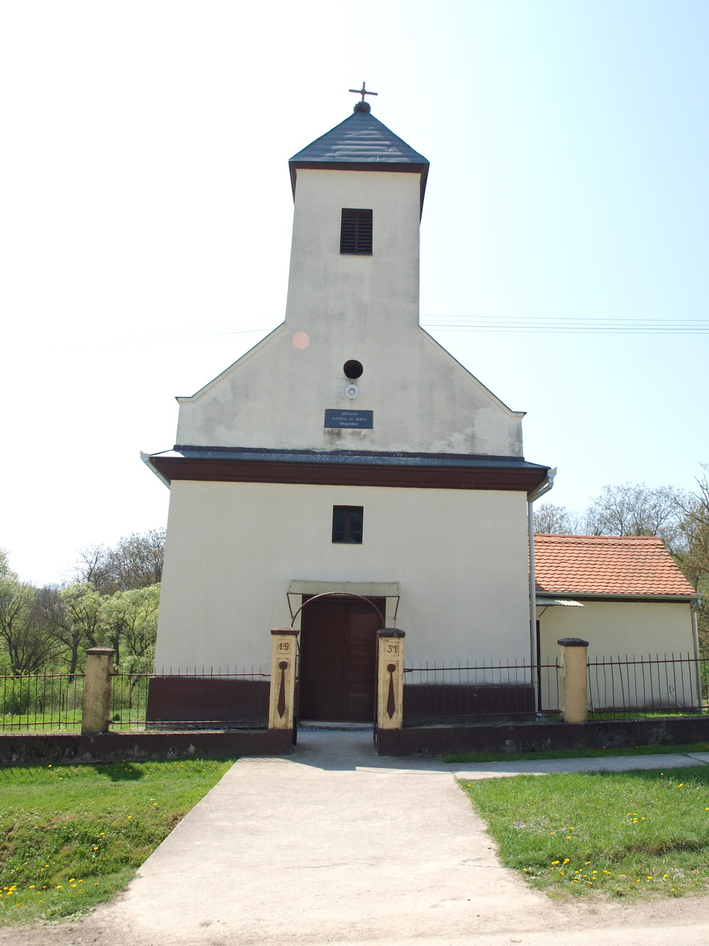 Kapela svetog Roka u selu Glogovica, Brodsko-posavska županija.